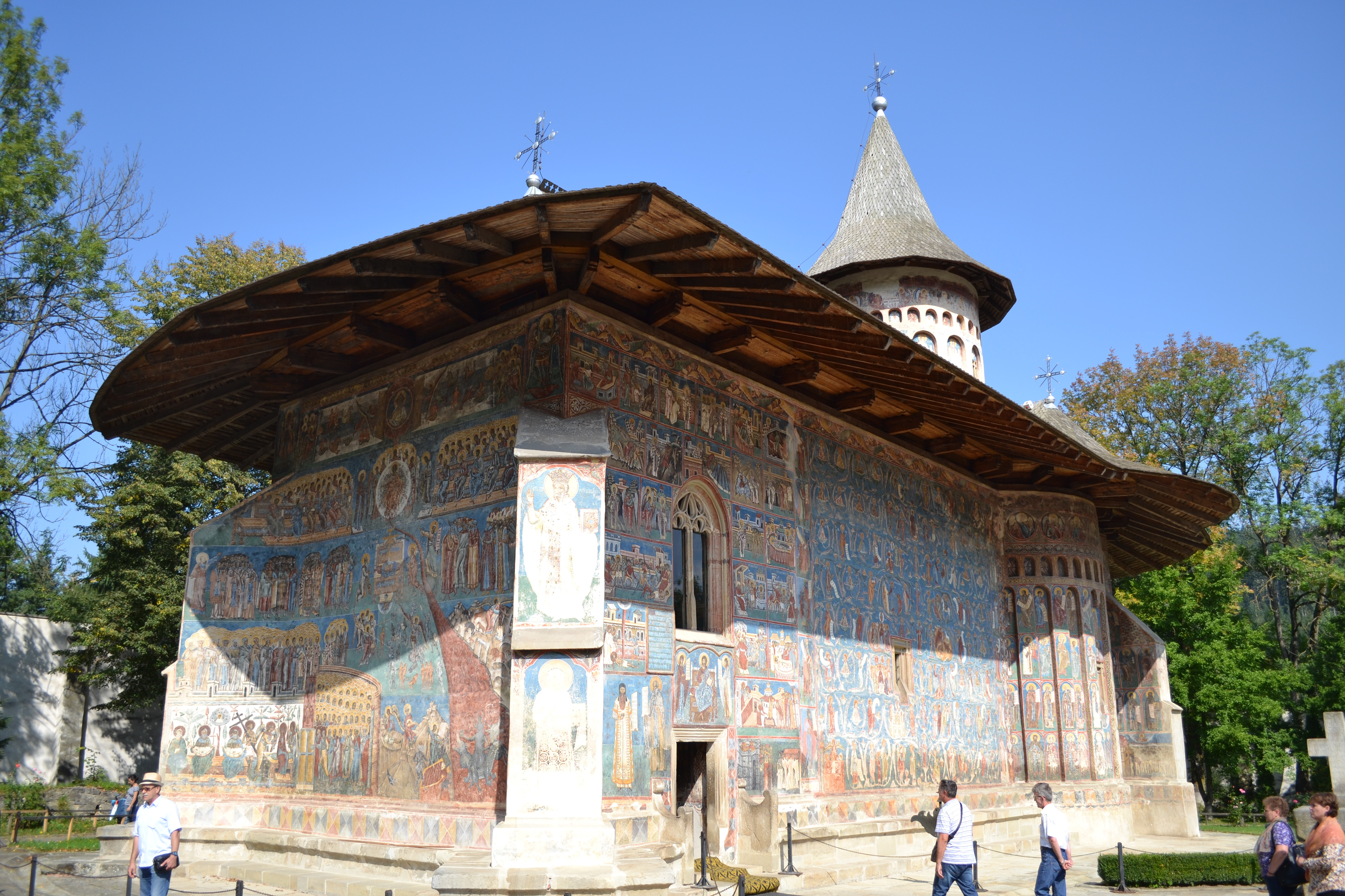 Biserica Sfantul Gheorghe din incinta Manastirii Voronet